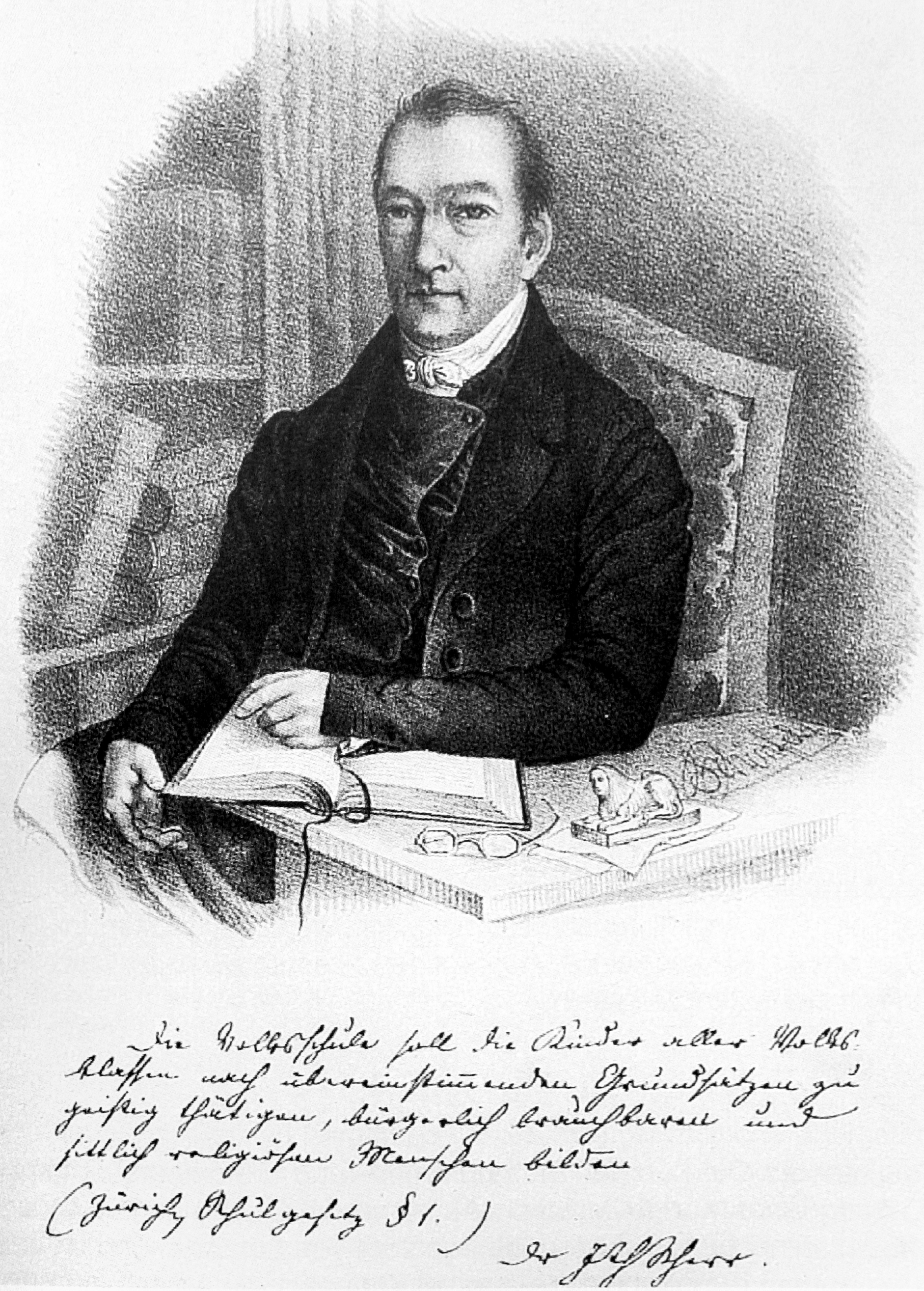 Thomas Scherr, erster Direktor des Seminars Küsnacht, 1845